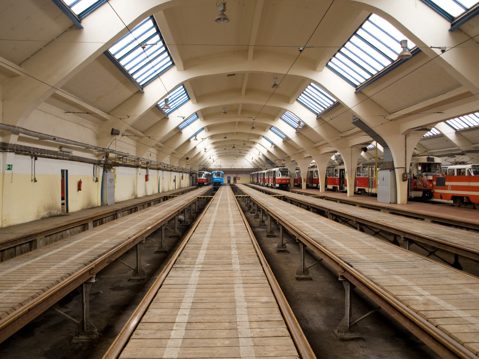 Hala vozovny Pankrác, Praha